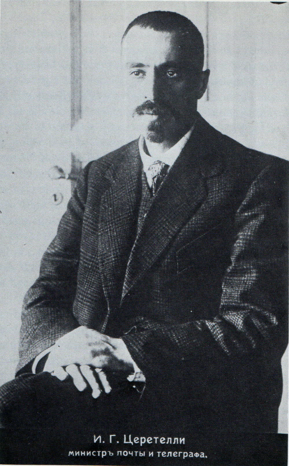 El político menchevique georgiano Irakli Tsereteli como ministro de Correos y Telégrafos, en un postal de la época, 1917.